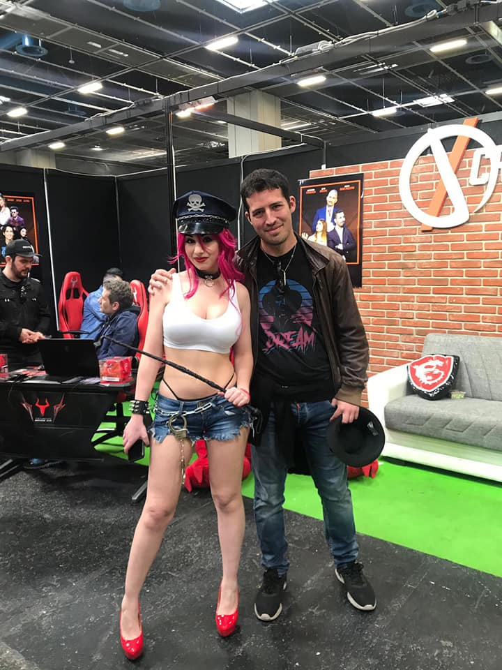 La famosa cosplayer Giada Robin con un fan alla 25° Edizione di Torino Comics